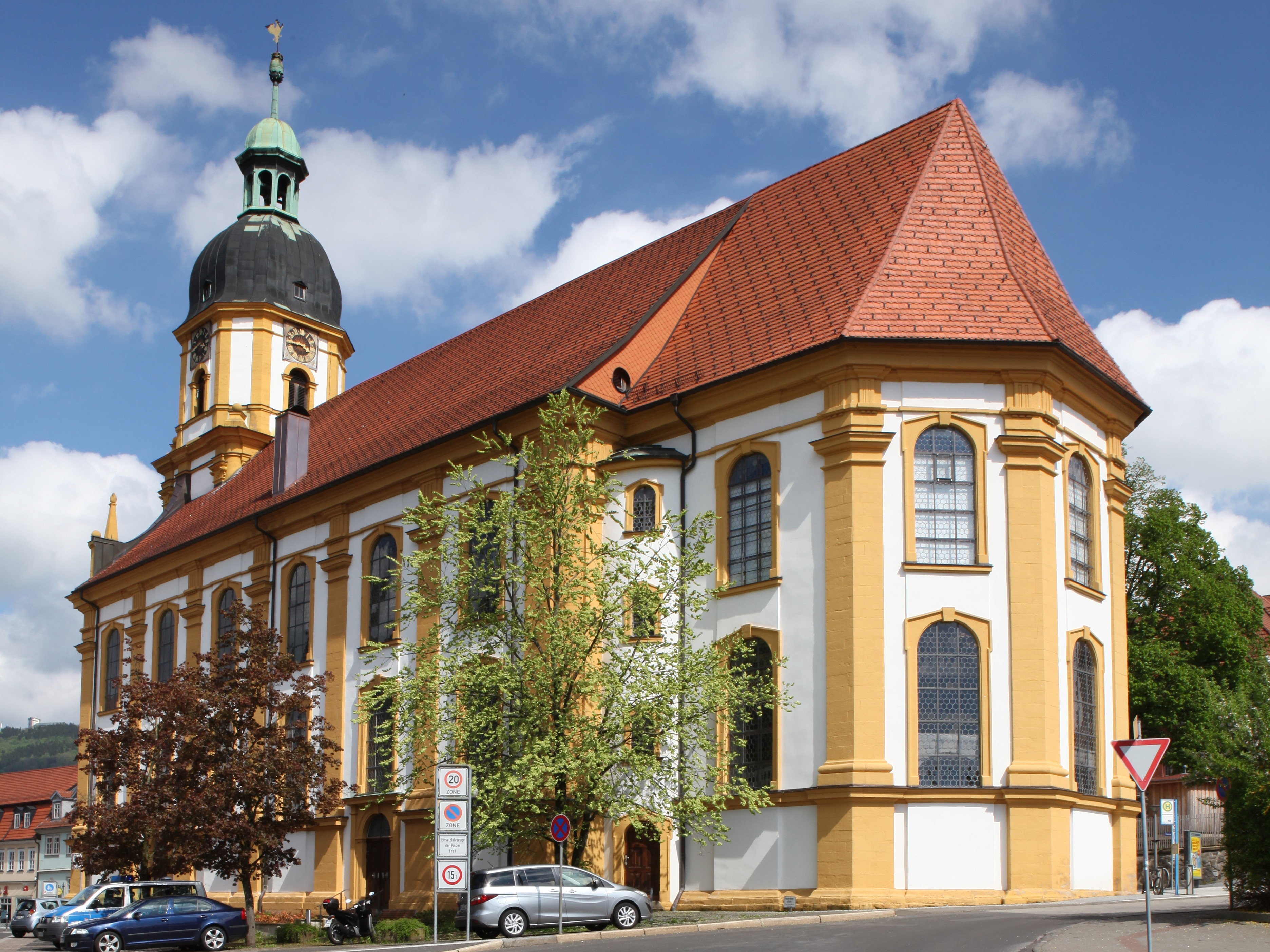 Kreuzkirche in Suhl